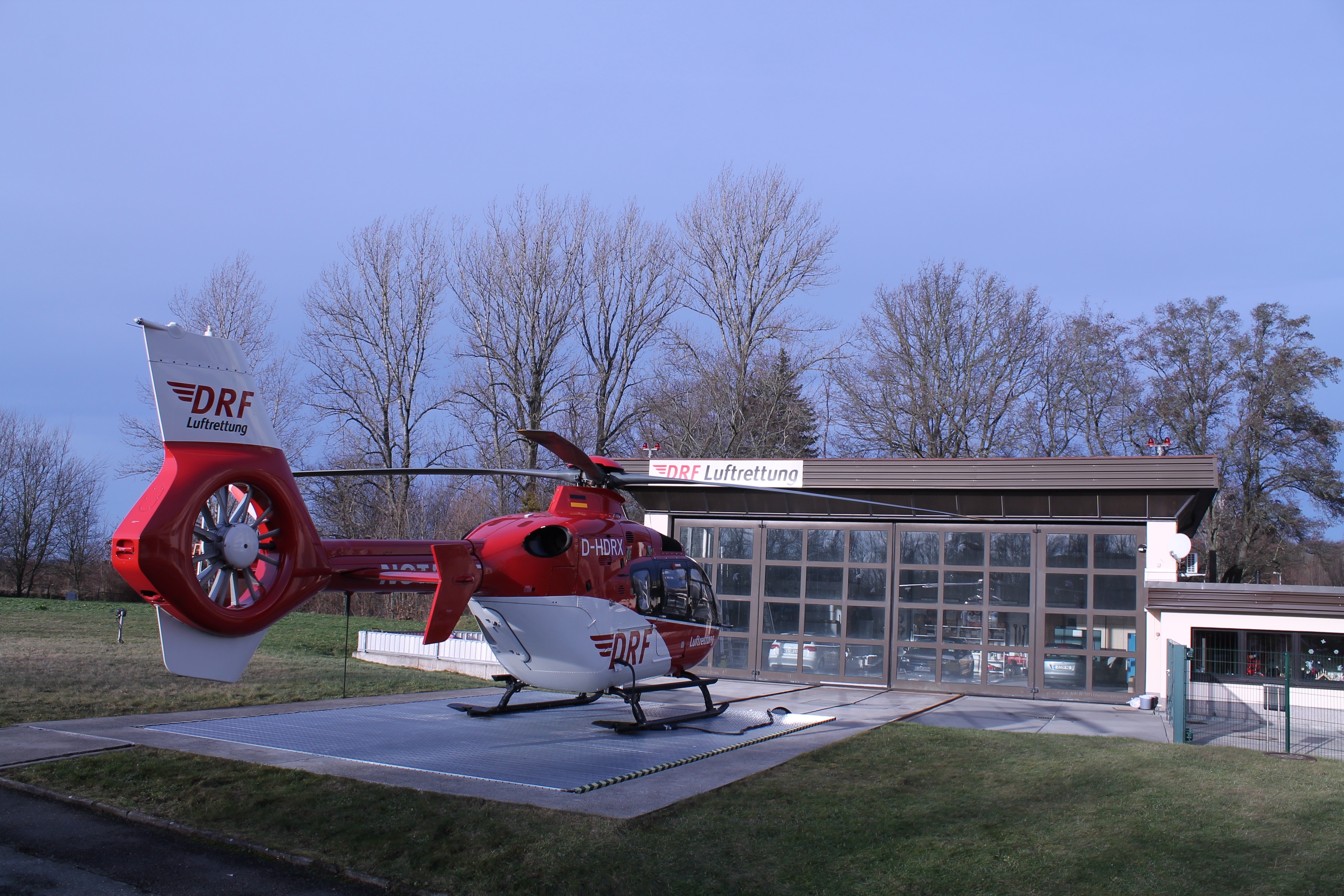 Hubschrauber EC 135 der DRF Luftrettung, startbereit am Stationierungsort Heinrich-Braun-Krankenhaus. Zwickau-Marienthal, Sachsen, Deutschland.